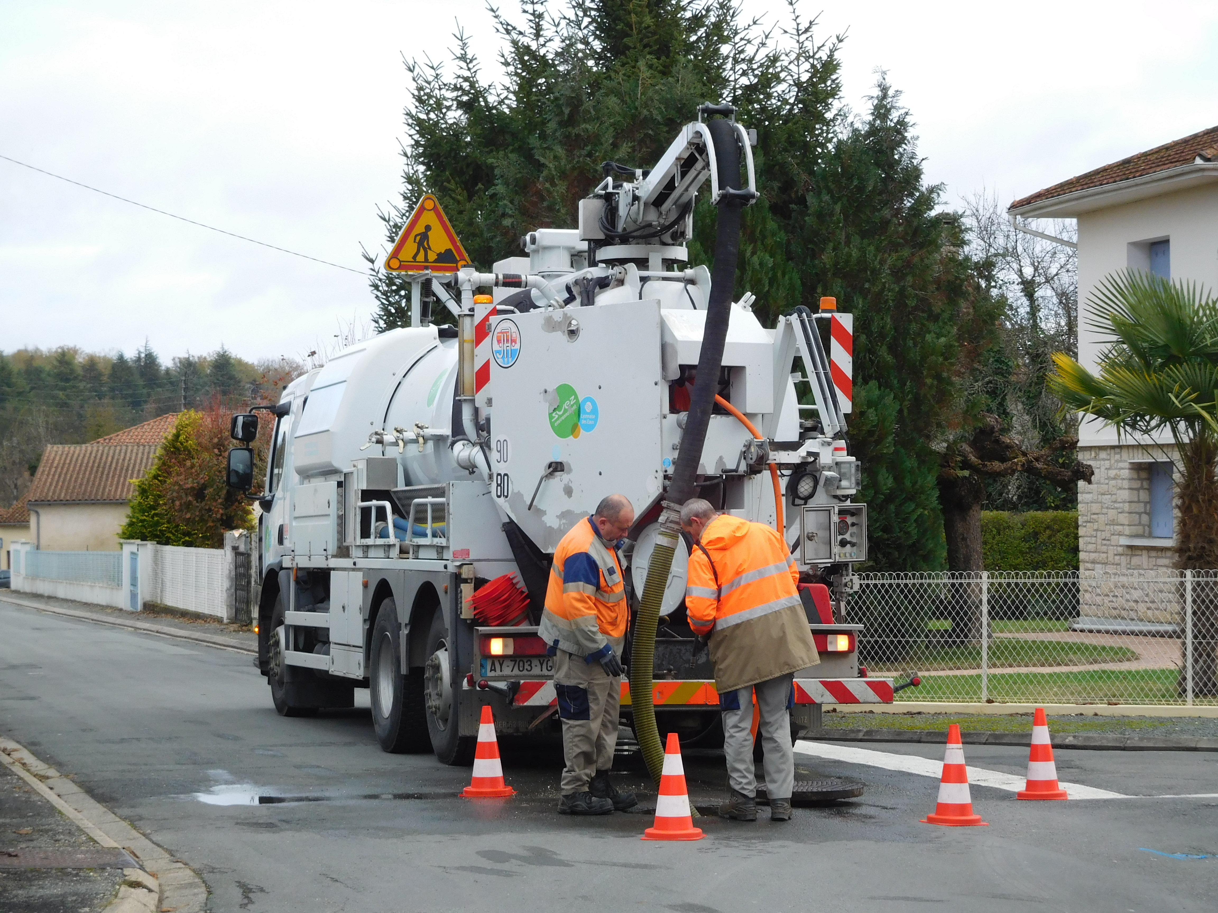 Deux égoutiers utilisant un hydrocureur pour déboucher un égout ; rue de la Nouzillère, Mussidan, Dordogne, France.